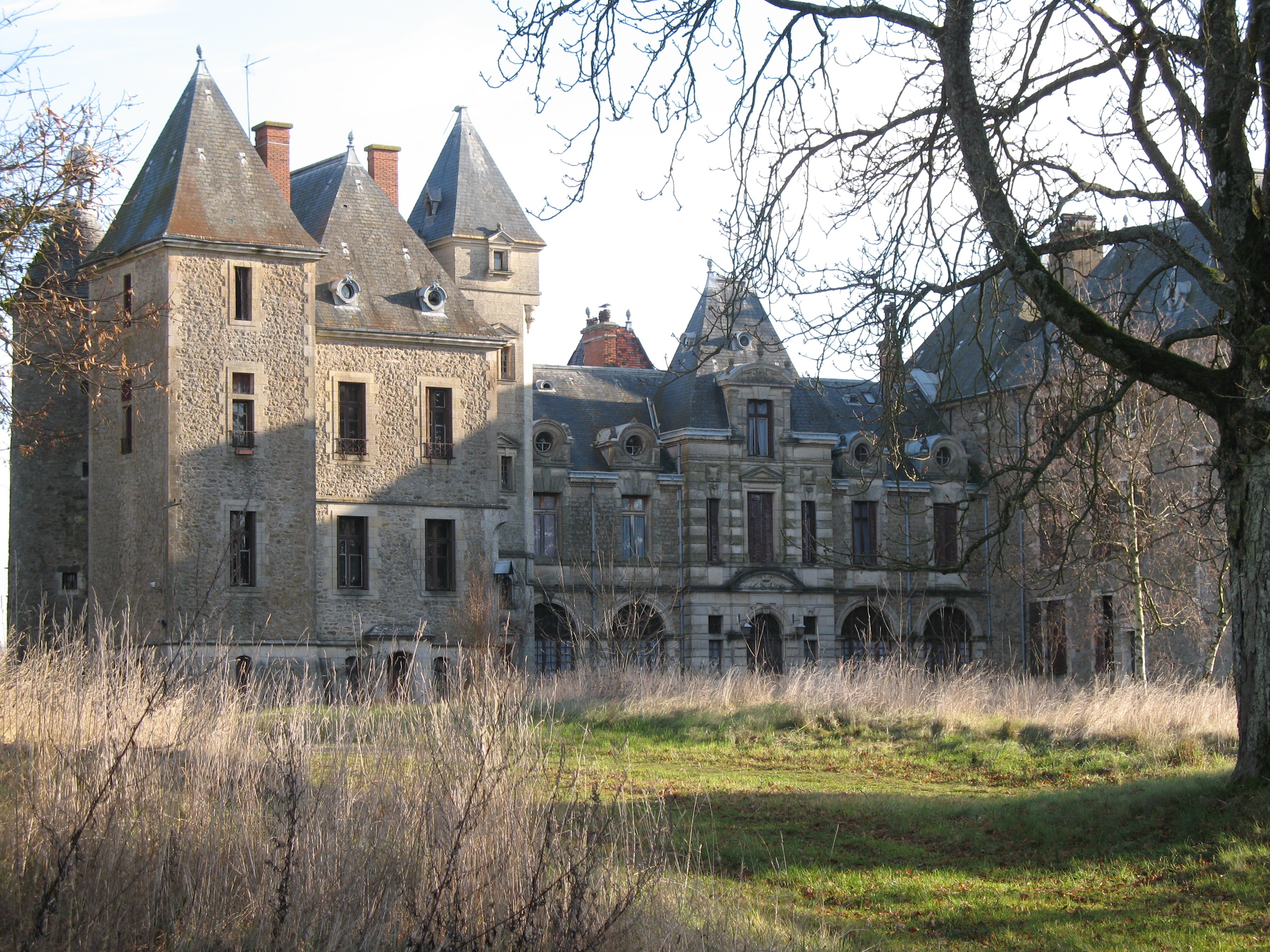 château de la Rochette (Saône-et-Loire)